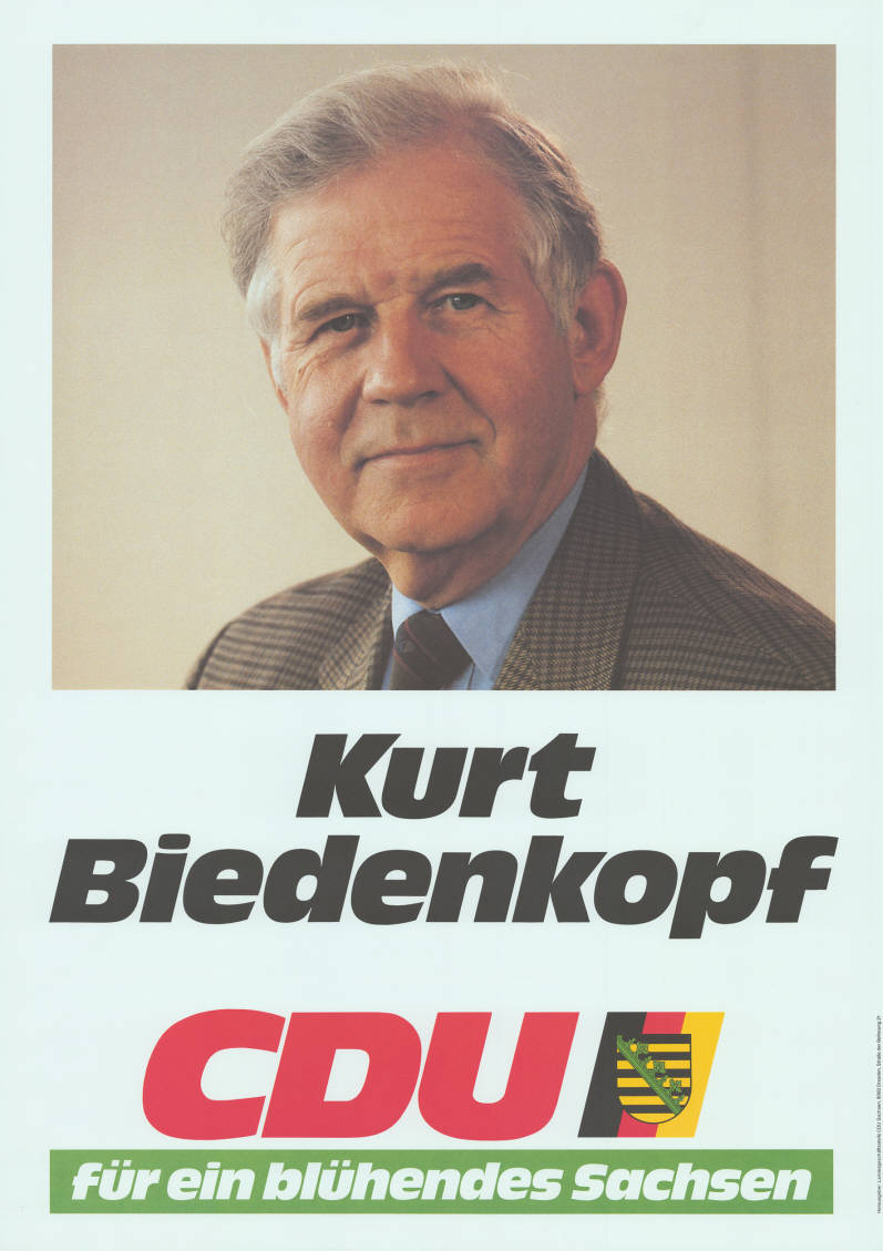 Kurt Biedenkopf CDU für ein blühendes Sachsen Abbildung: Porträtfoto Plakatart: Kandidaten-/Personenplakat mit Porträt Auftraggeber: Landesgeschäftsstelle CDU Sachsen, Dresden Objekt-Signatur: 10-035 : 1 Bestand: Landtagswahlplakate Sachsen (10-035) GliederungBestand10-18: Landtagswahlplakate Sachsen (10-035) » CDU Lizenz: KAS/ACDP 10-035 : 1 CC-BY-SA 3.0 DE